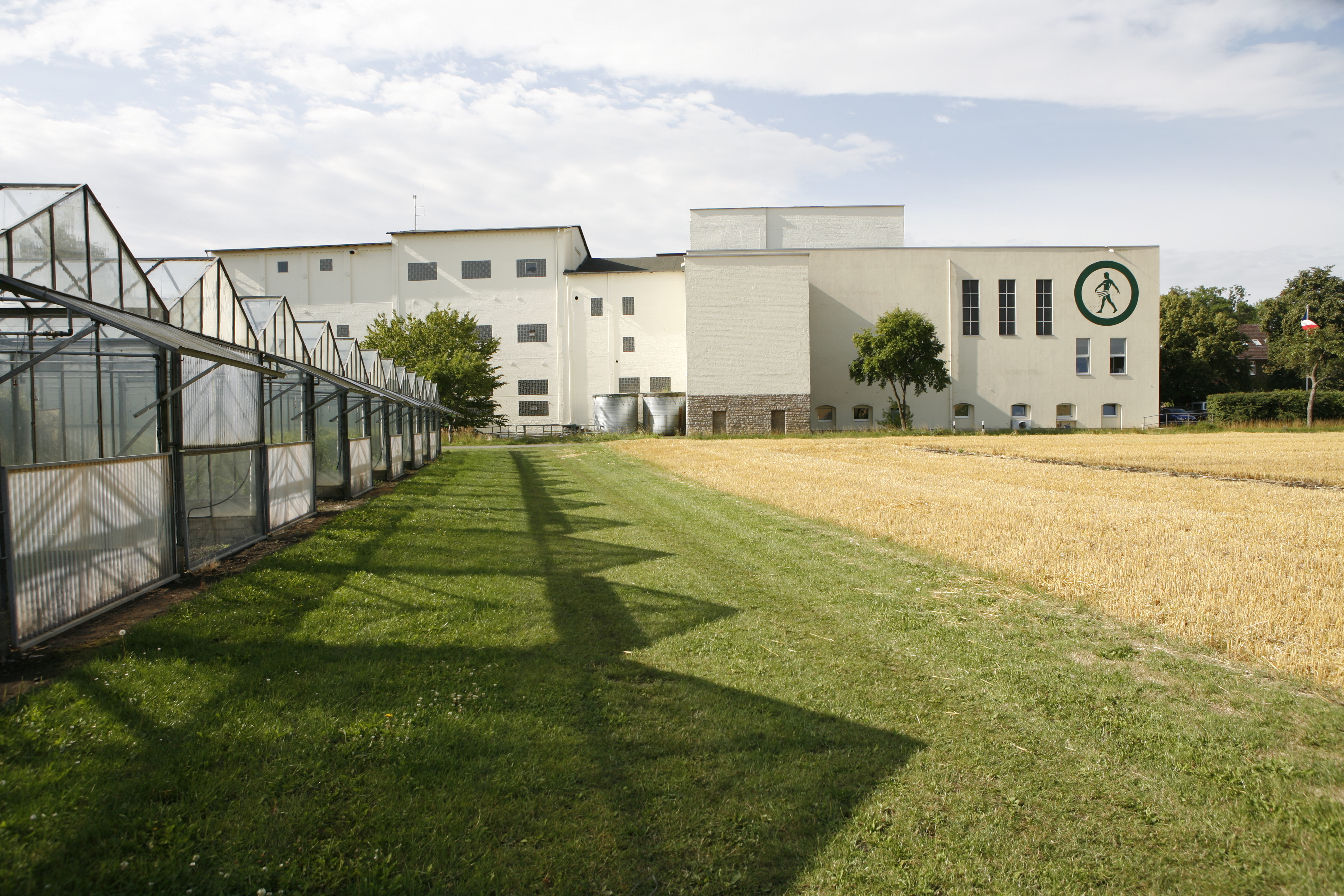 Blick auf den Firmensitz in Söllingen